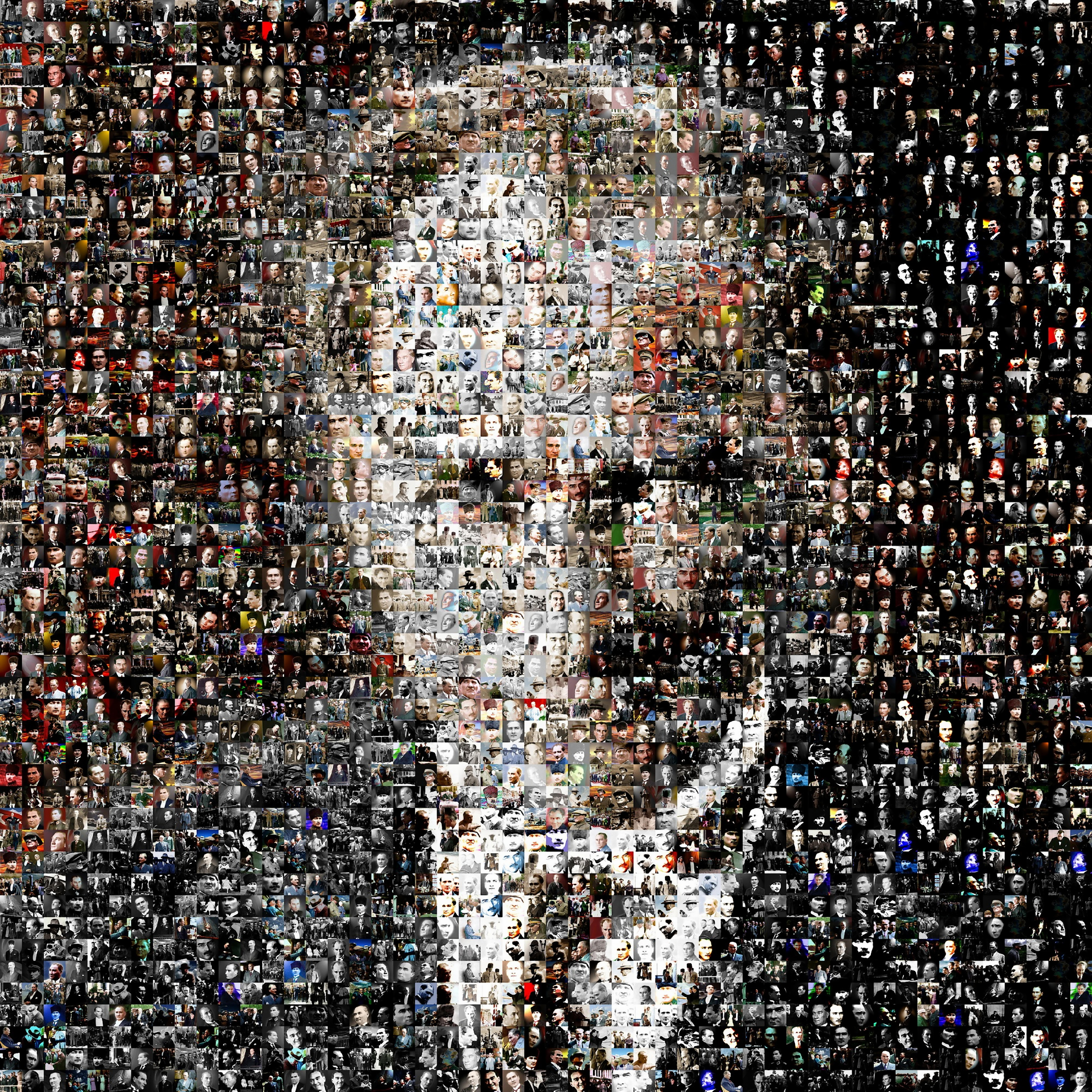 Ataturk Mosaic